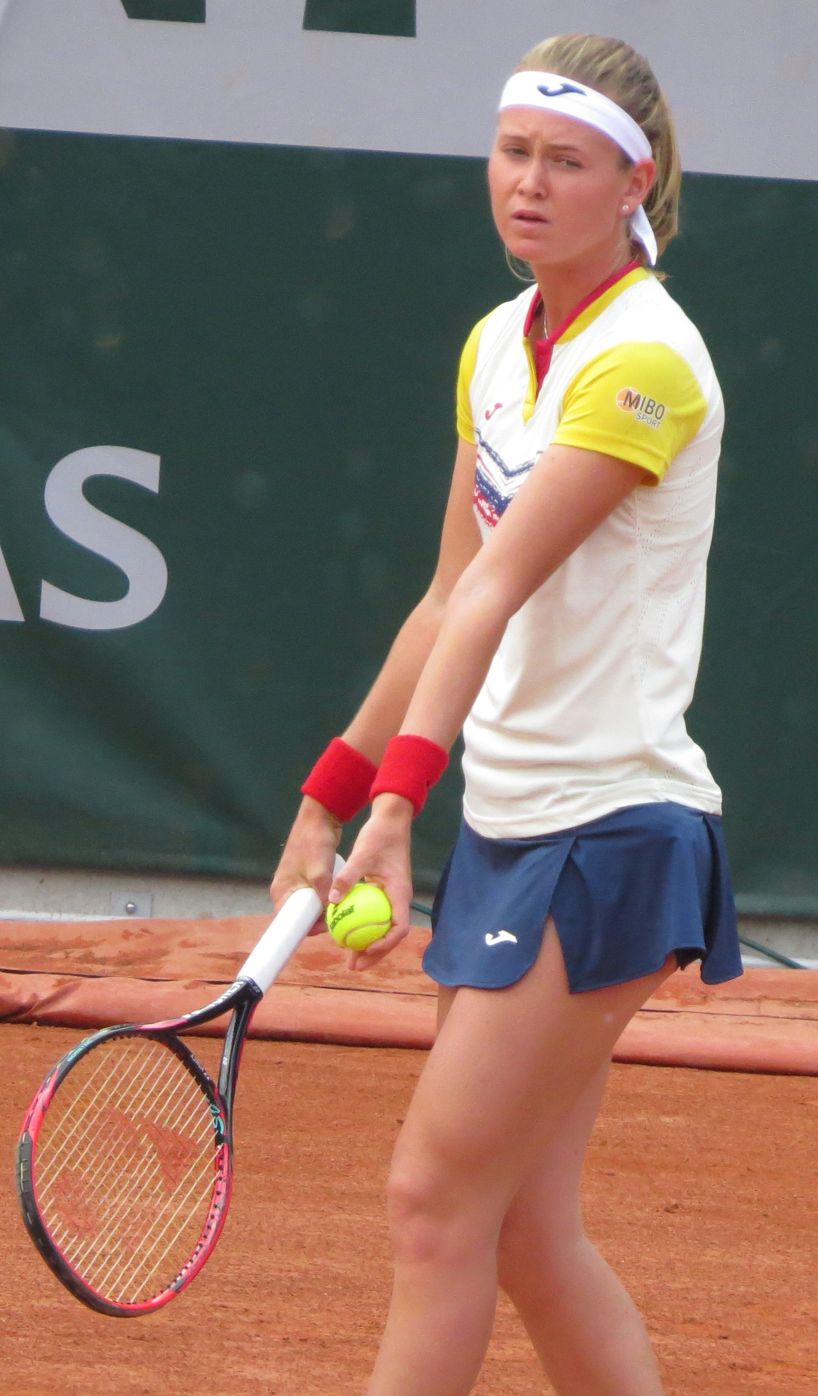 Tenistka Marie Bouzková v úvodním kole kvalifikace French Open 2018 proti Tessah Andrianjafitrimovové (dvorec č. 18).